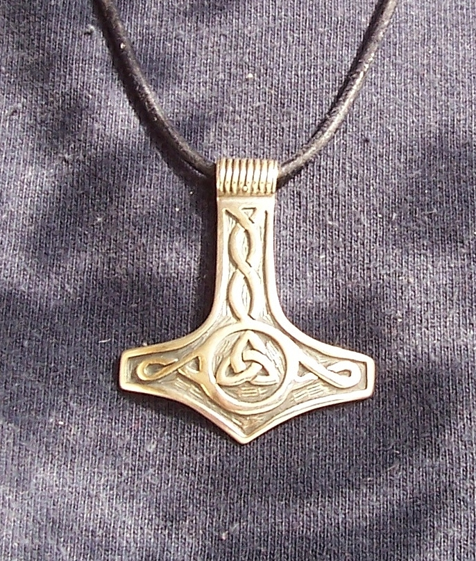 Modern Mjölnir, Thorshammer